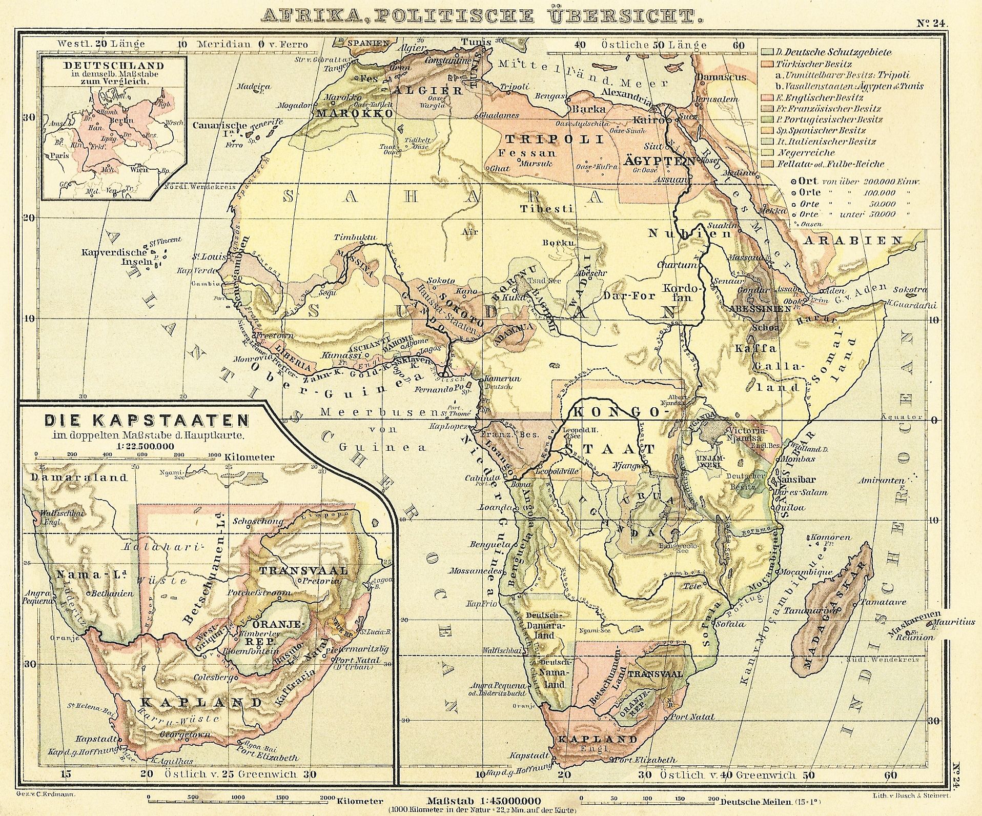 Afrika, Politische Übersicht mit Nebenkarte der Kap-Staaten, Karte Nr. 24 aus E. Debes' Schul-Atlas für die Oberklassen höherer Lehranstalten, Sechste verbesserte Auflage, Verlag von H. Wagner & E. Debes, Leipzig 1888